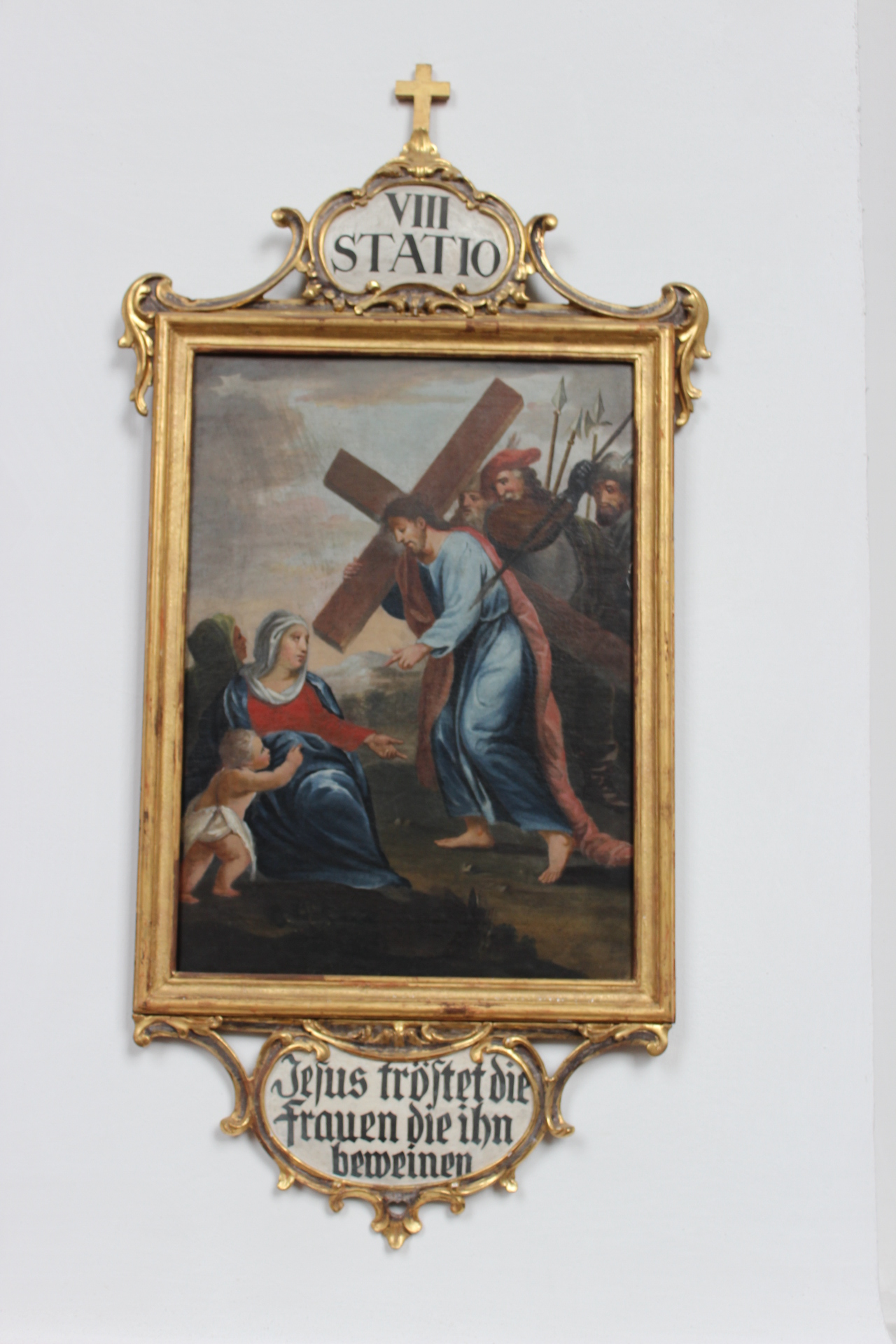 8. Station des Kreuzwegs der Heidelberger Jesuitenkirche